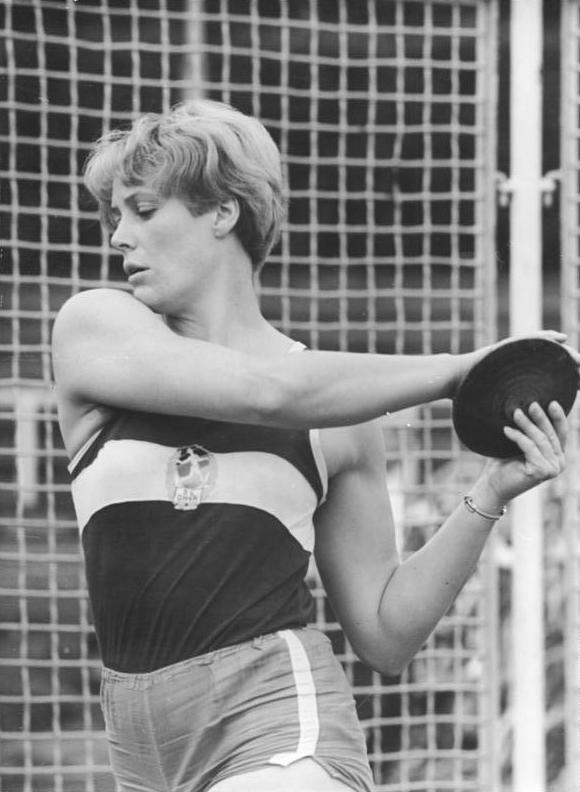 Karin Illgen Zentralbild Wendorf 10.09.1967 Potsdam: Leichtathletik-Klubpokal-Endkämpfe. Zu den herausragenden Leistungen beim DVfL-Klubpokal der Leichtathleten Endrunde A am 09.09.1967 im Potsdamer Stadion Luftschiffhafen zählte die Siegerweite von 58,08 m durch Karin Illgen (SC Wissenschaft DHfK Leipzig-Foto) im Diskuswerfen der Frauen. Die Leipzigerin gehört zum DDR-Aufgebot für das Europapokalfinale der Frauen am 15.09.1967 im Zentralstadion von Kiew.